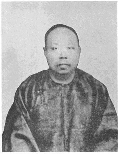 中文（台灣）: 禮部左侍郎張亨嘉